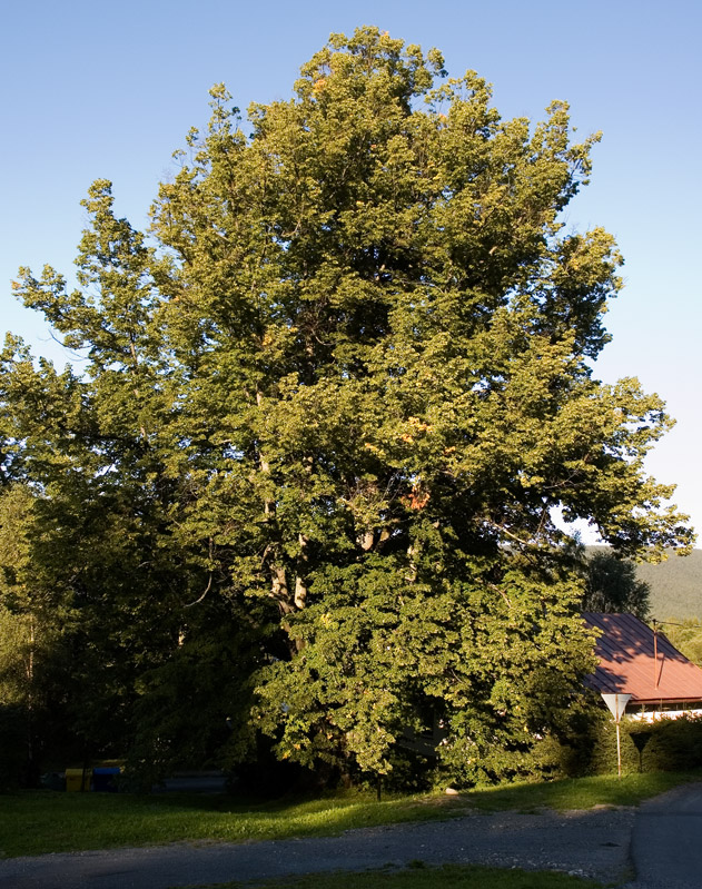 Lípa pod Vyhlídkou v Hojsově Stráži